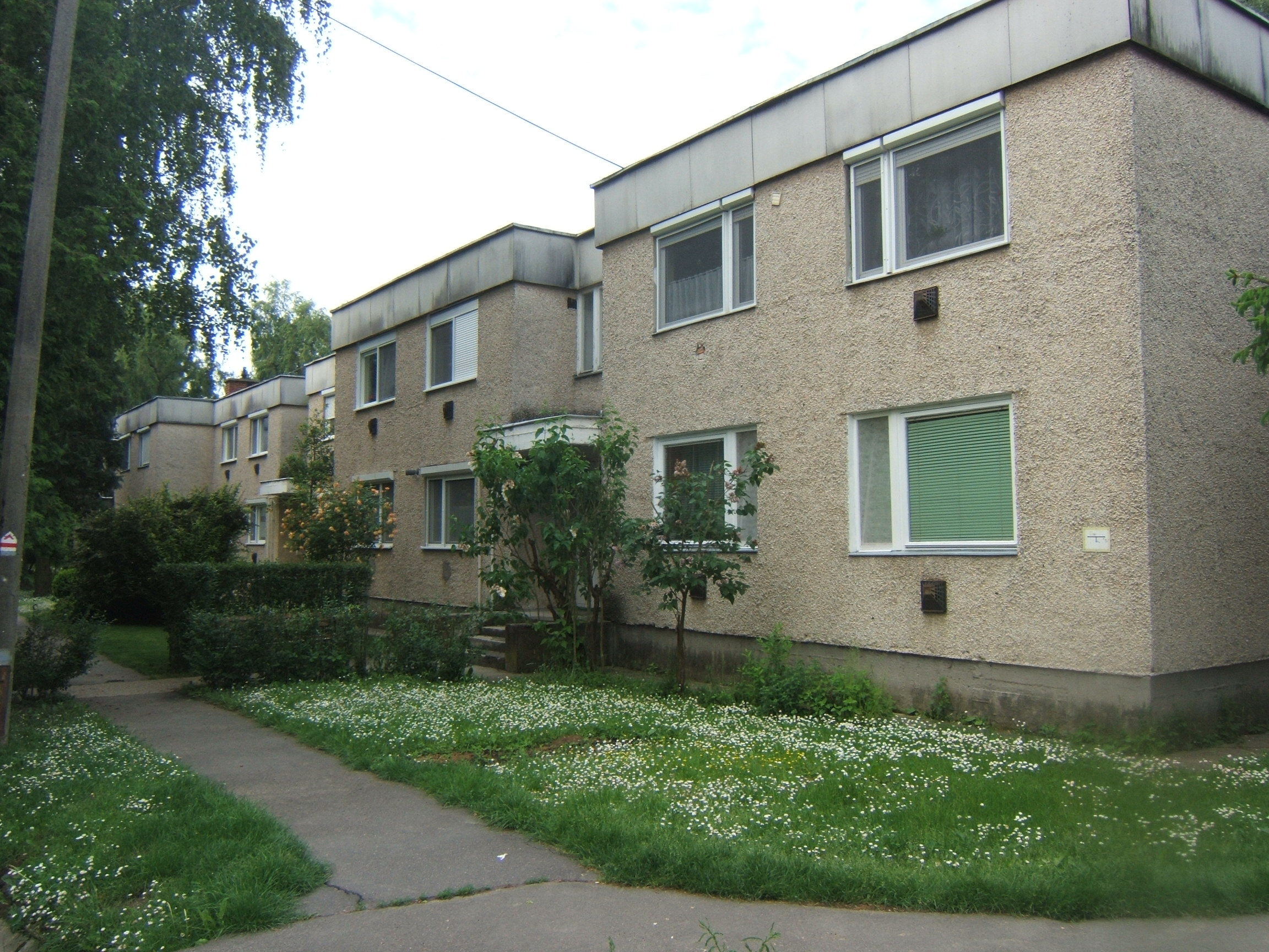 Kaposvár, Zaranyi lakótelep